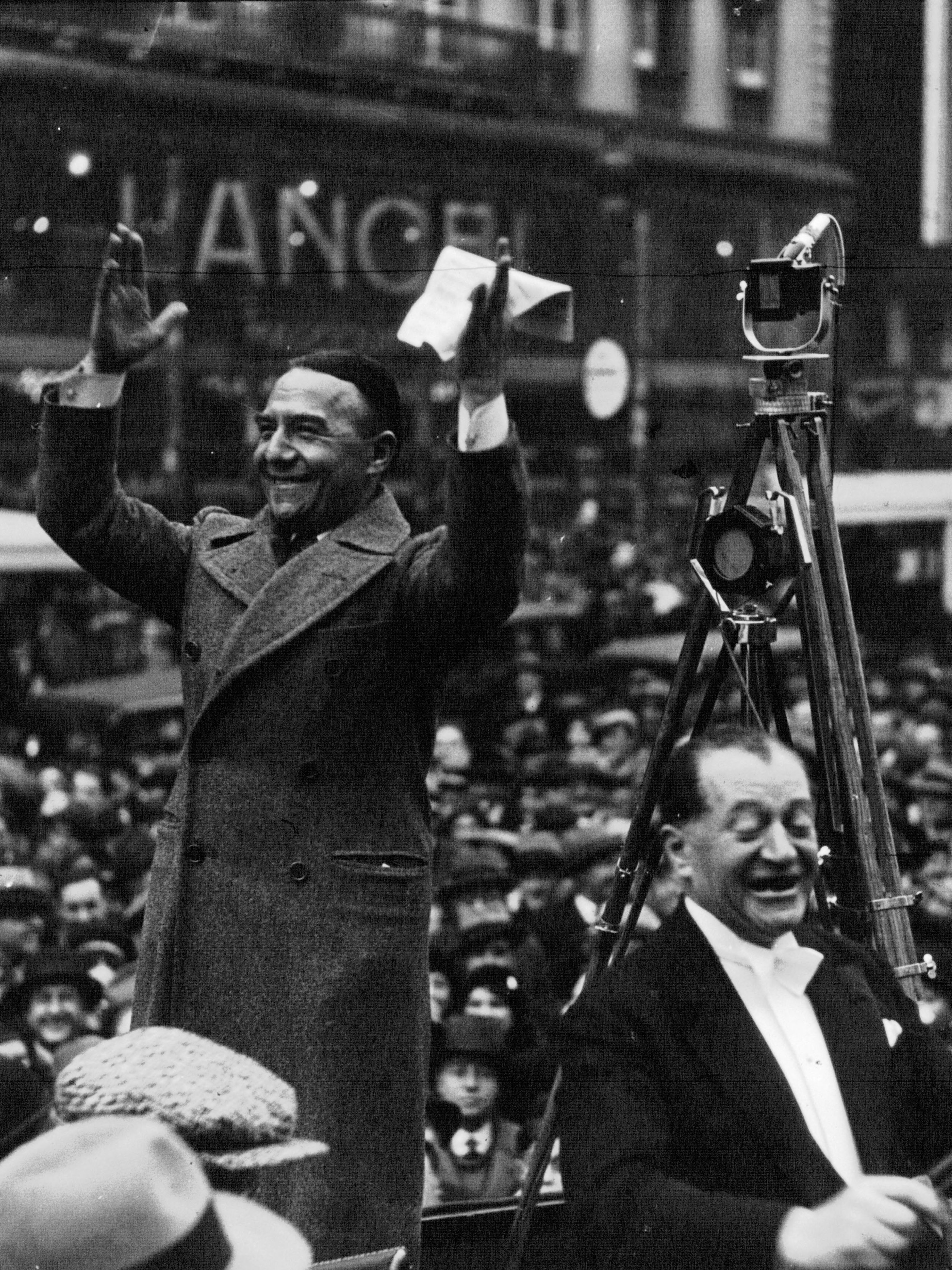 Le chanteur et acteur français Georges Milton (1886-1970) saluant la foule après avoir chanté au carrefour Richelieu-Drouot à Paris pour la deuxième quinzaine des boulevards en 1932.